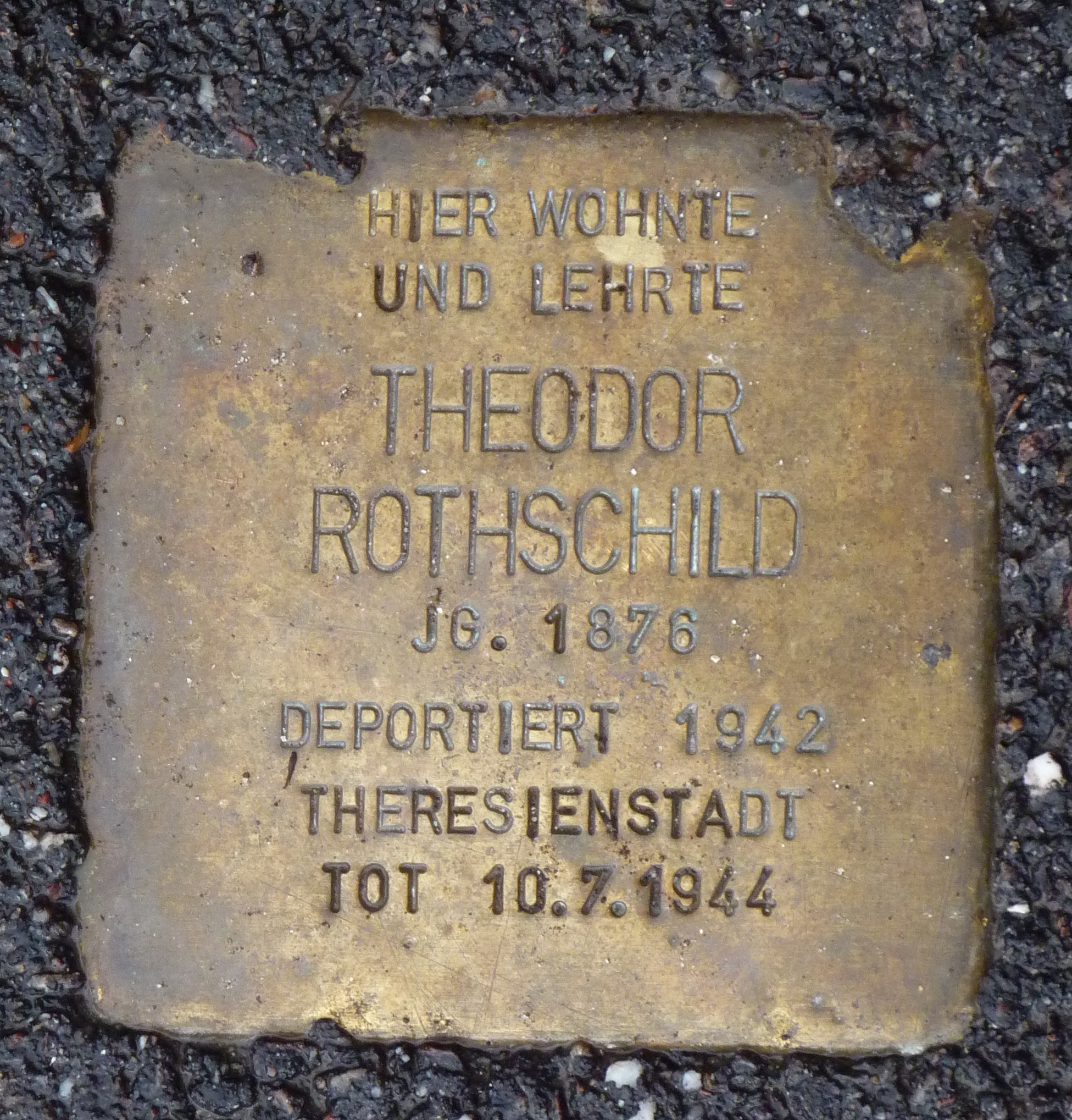 Stolperstein für Theodor Rothschild (siehe Gedenkbuch des Bundesarchivs)